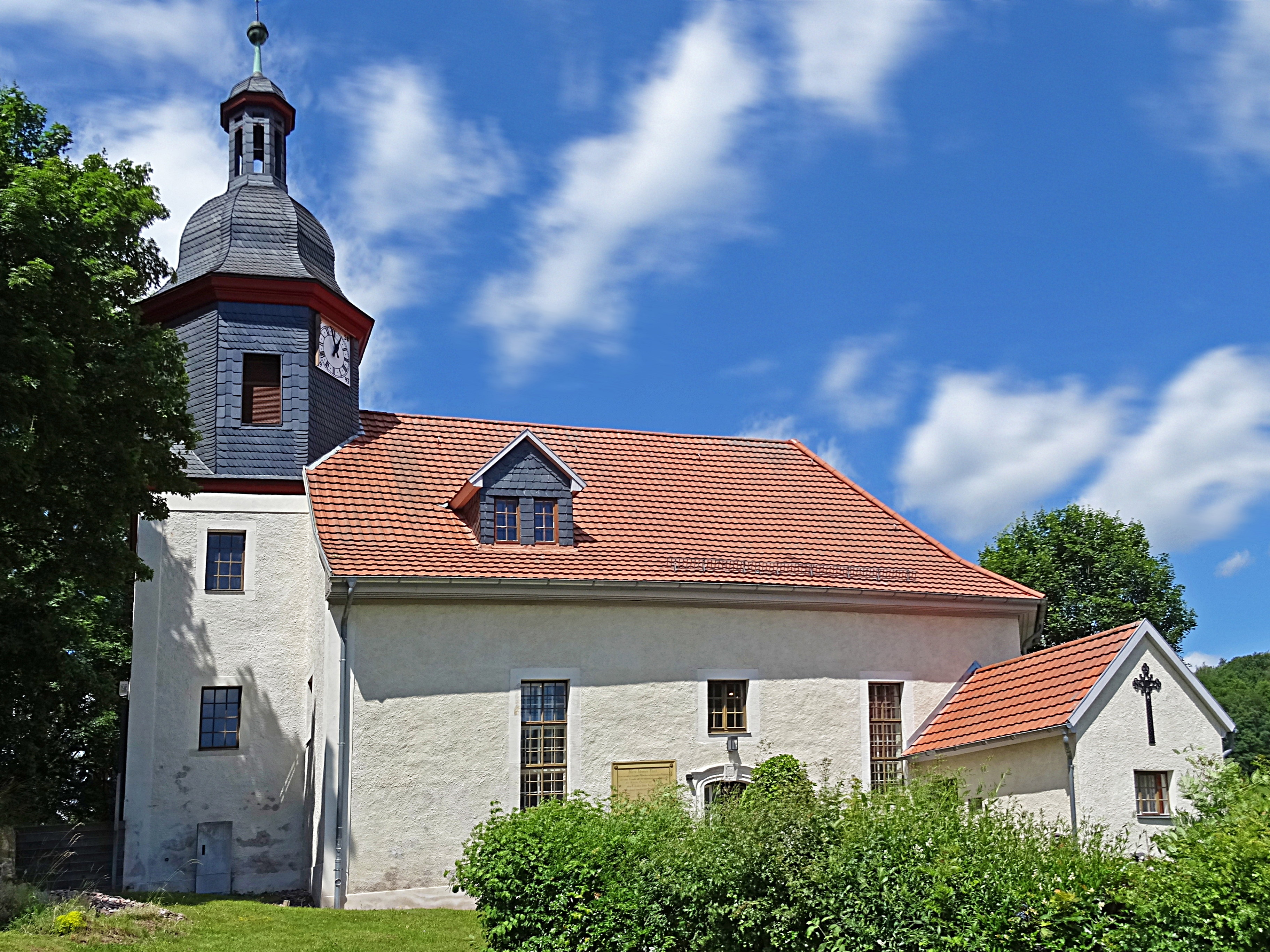 die Barockkirche Seebach wurde 1736 vom Apotheker und Medicus Johannes Dicel gestiftet